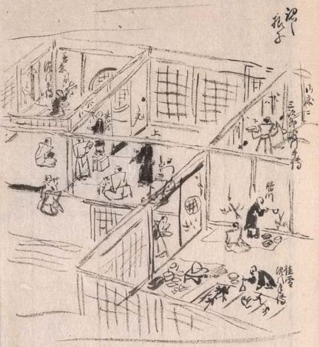 『公用日記』天保12年10月14日条 本丸大奥御小座敷御上之問